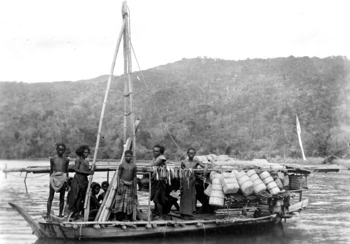 Repronegatief. Paloewéprauw in de haven van Reo